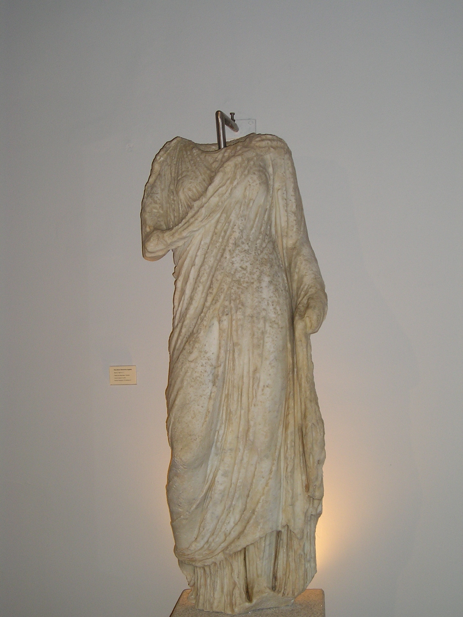 Estatua femenina romana de mármol, togada, encontrada en las excavaciones del Palacio de Mayoralgo en el casco antiguo de la ciudad de Cáceres (España). Procede del antiguo foro de la Colonia Norba Caesarina y fue esculpida en el siglo II. Posiblemente representaba a una diosa o a una dama de la familia imperial. Esta depositada en el Museo de Cáceres.